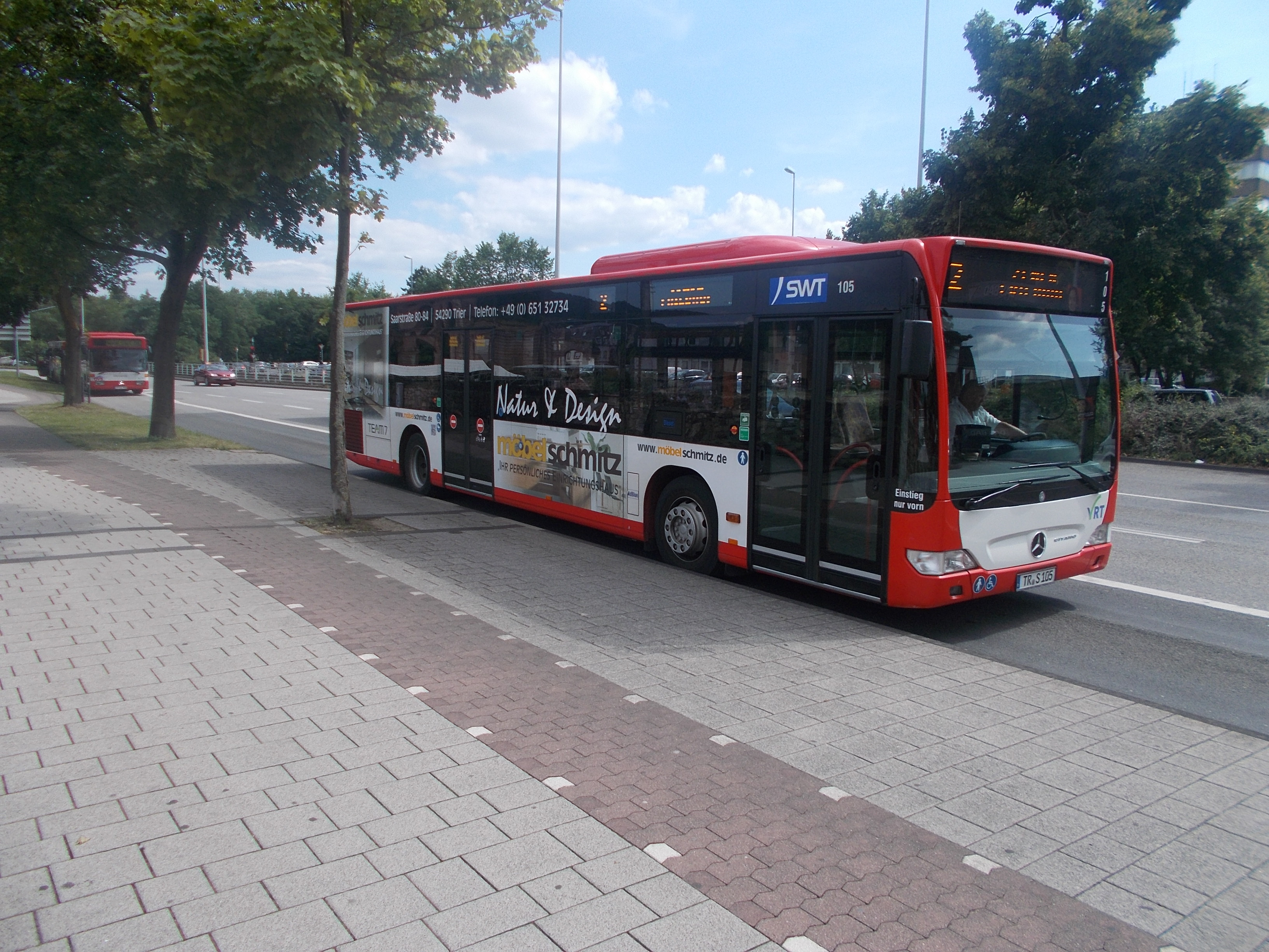 Ein Mercedes-Benz Citaro G (TR-S 105 der Stadtwerke Trier) hält an der Haltestelle Kaiserthermen in Trier (Bussteig B).